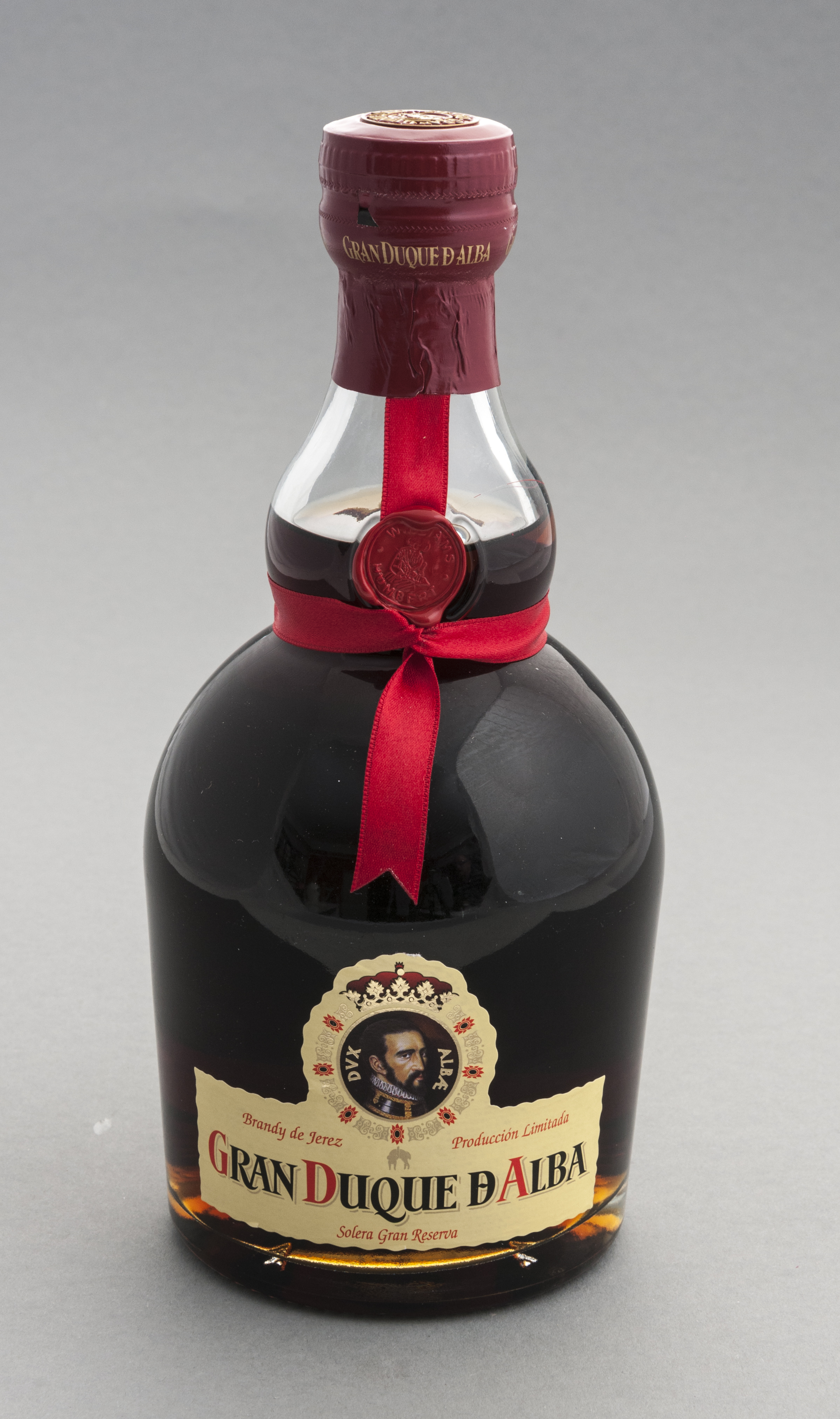 Flasche